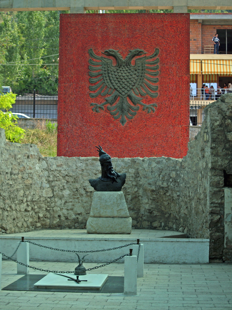 Skanderbeg's grave in Lezha, Albania